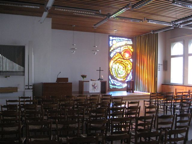 Lichtenplatzer Kapelle, Glasfenster.jpg, 64kB, 06.03.2011